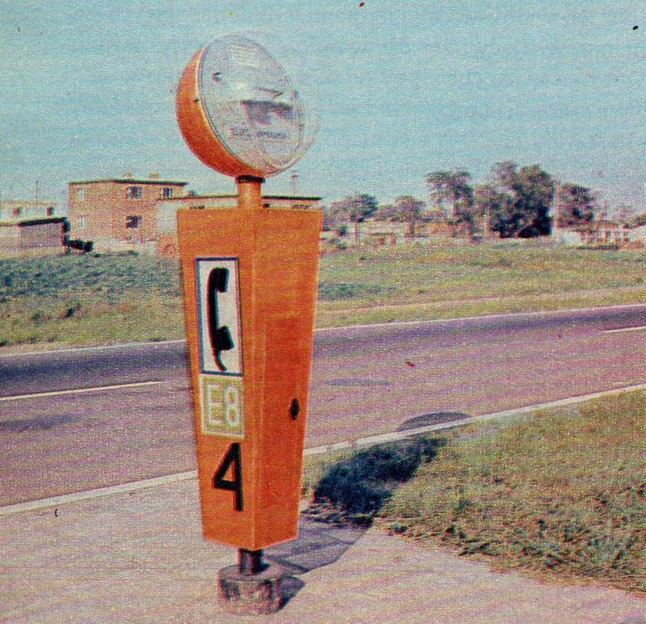 Droga krajowa nr 2 (dawniej E8) w okolicy Poznania.